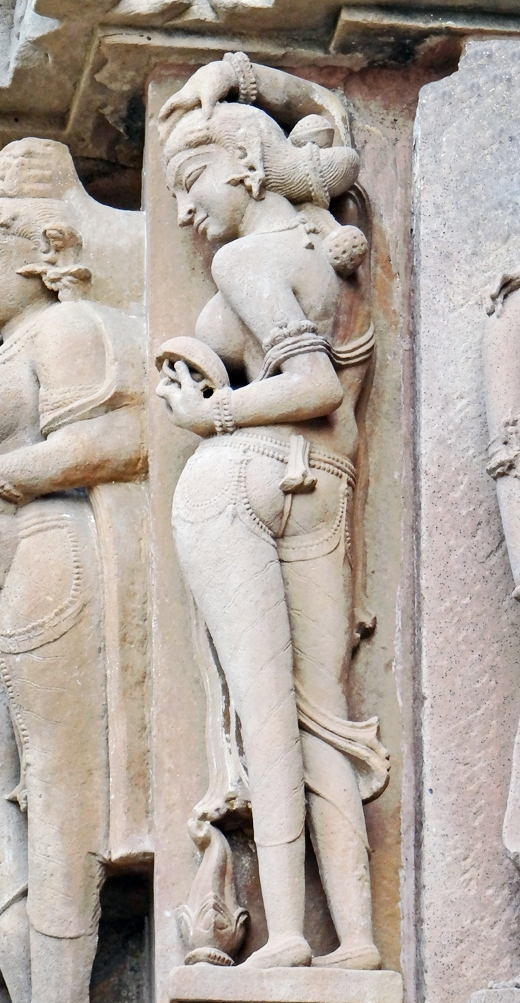 Sculptures murales d'inspiration tantrique sur les murs du temple Devi Jagdambi à Khajuraho. Pour le Tantrisme, il ne s'agit pas de représentations de poses sexuelles mais de celles de couples yogi unis dans l'extase et servant de symbole universel à l'accomplissement spirituel (Genetical craftmanship of the word of God). Le Tantrisme tente de saisir la nature du temps et de remonter l'échelle de la Genèse en réveillant toutes les énergies et les émotions disponibles, pour les rassembler et en faire le véhicule vers l'Illumination. ____________ Les temples de Khajuraho sont inscrits sur la liste du patrimoine mondial de l'UNESCO. A l'époque médiévale, le site appelé Jejakbhukti, était la capitale du royaume des rajas Chandelas qui ont pris le pouvoir au début du Xème siècle. Ils y ont fait construire 85 temples dont seulement 25 existent encore aujourd'hui dans différents états de conservation mais tous ont été restaurés. Le site de Khajuraho a perdu de son importance vers 1500. La plupart des temples sont construits en grès, certains sont en granite. Ils font partie des chefs-d’œuvre de l'art hindou. Article de Wikipedia sur Khajuraho Les temples sur Insecula Site indien